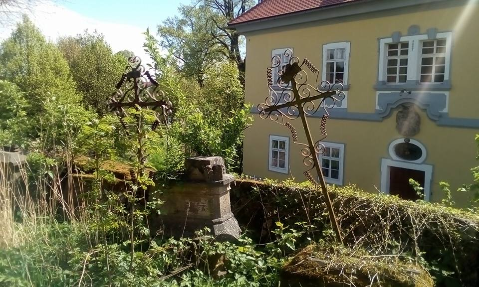 Horní Libchava, fara čp. 62